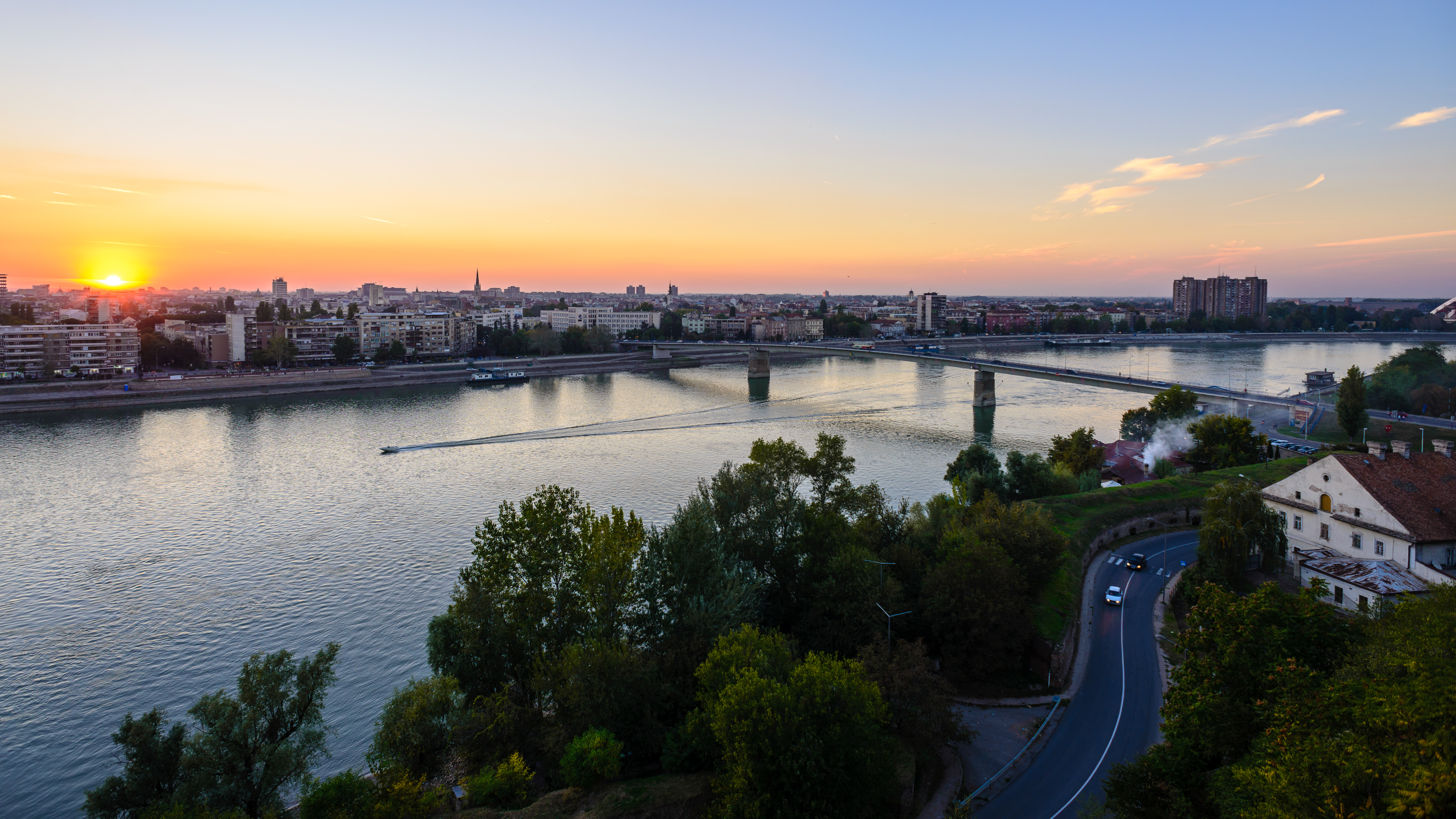 Danube